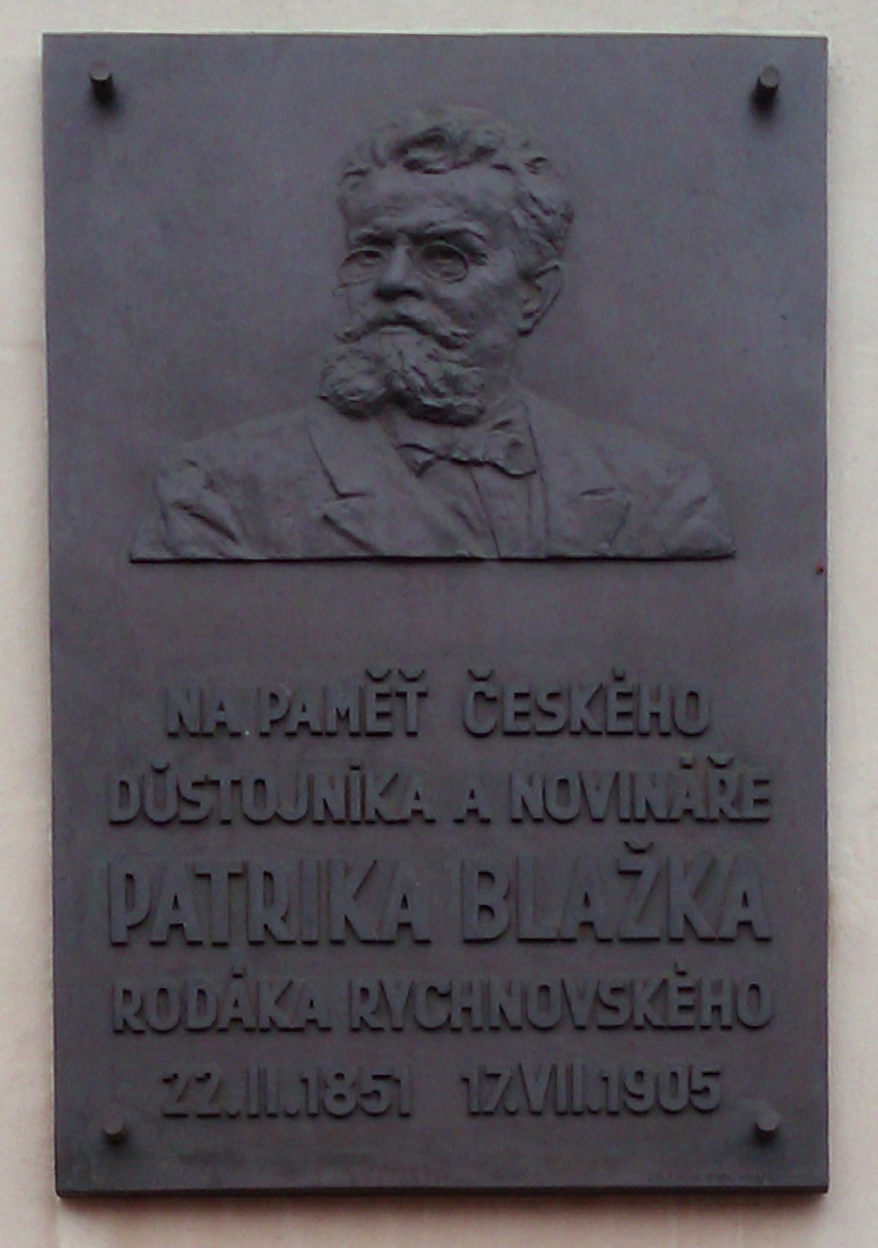 Patrik Blažek, český spisovatel a voják, 1851 - 1905. Panská čp. 79, Národní dům, Rychnov nad Kněžnou.